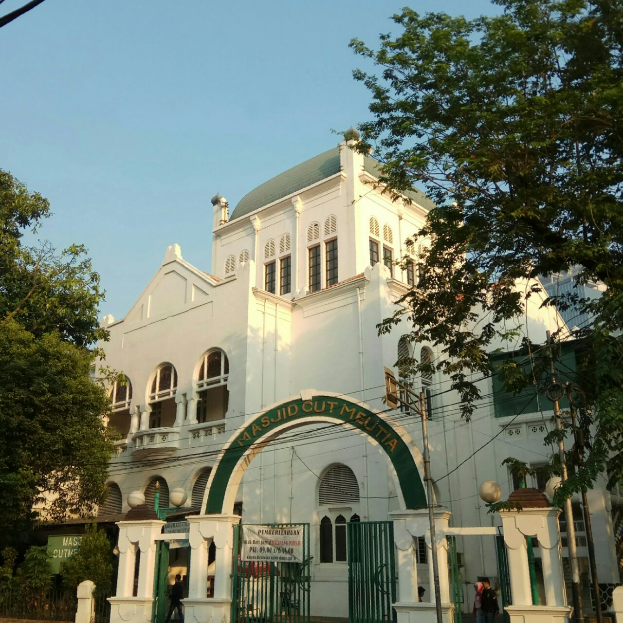 Cut Mutia Masjid Jakarta